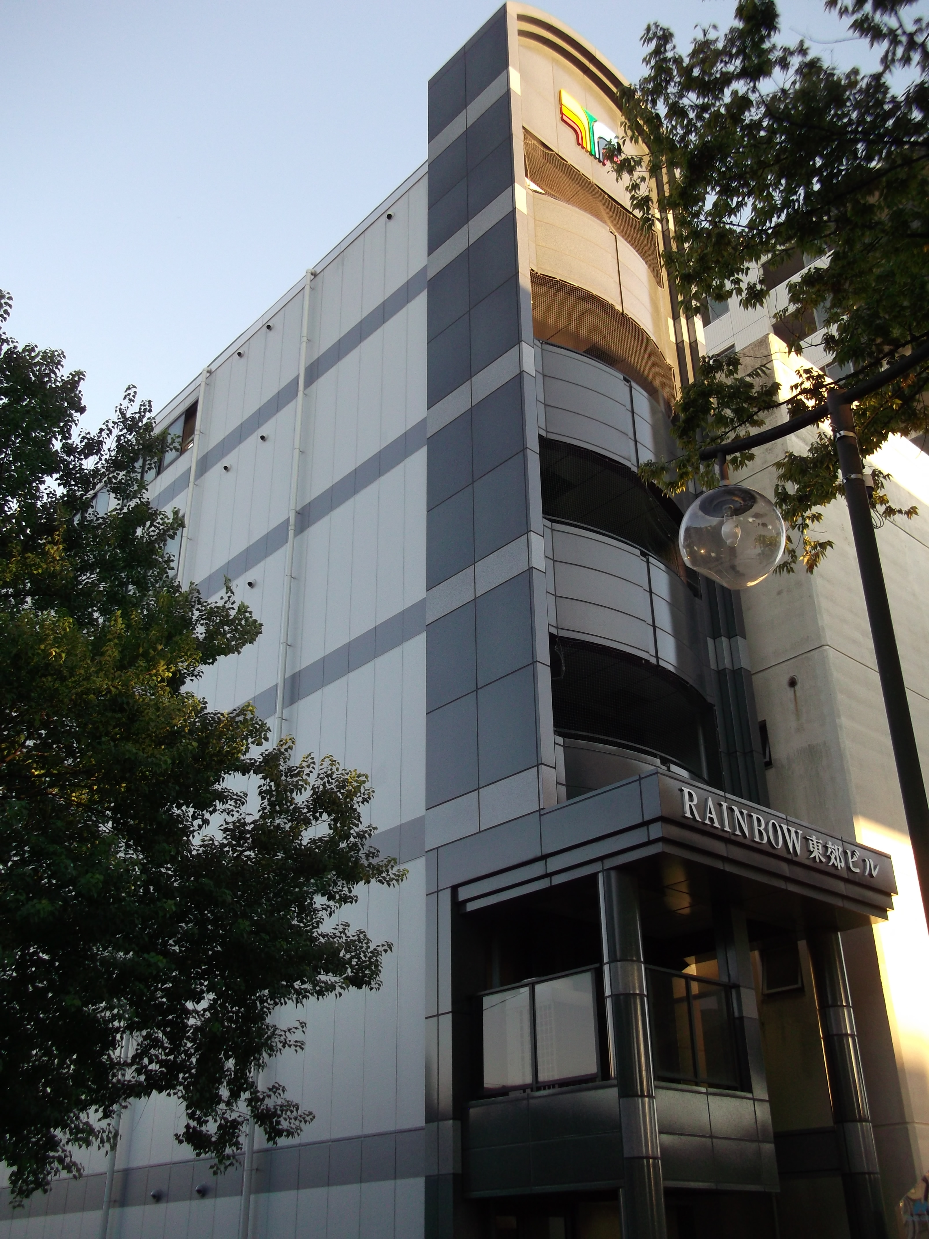 名古屋市昭和区のレインボー東郊ビルを西側公道（空港線）北側より撮影